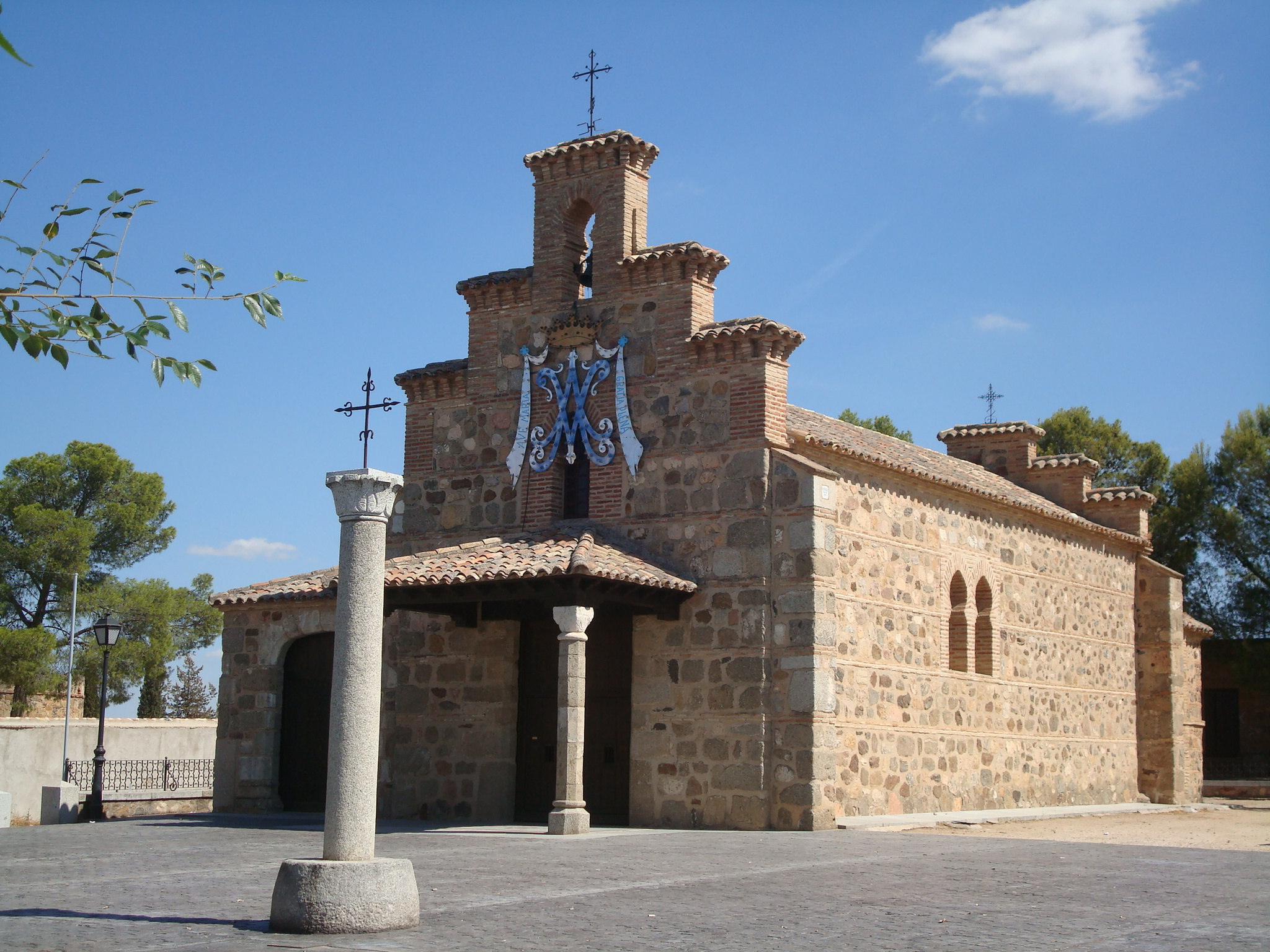 Vista de la ermita de la Virgen de la Natividad, en el cerro del mismo nombre, de Guadamur (Toledo).